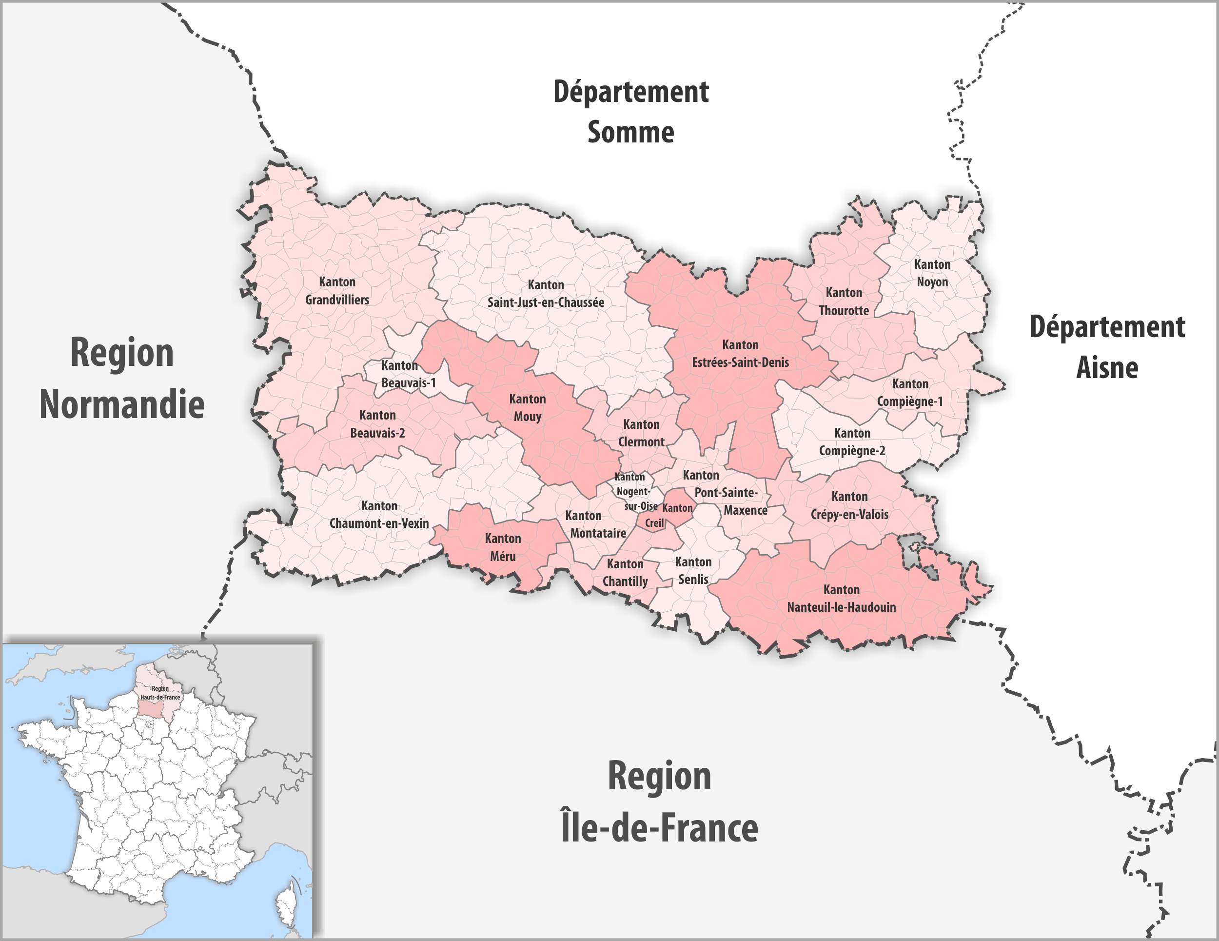 Gemeinden und Kantone im Departement Oise